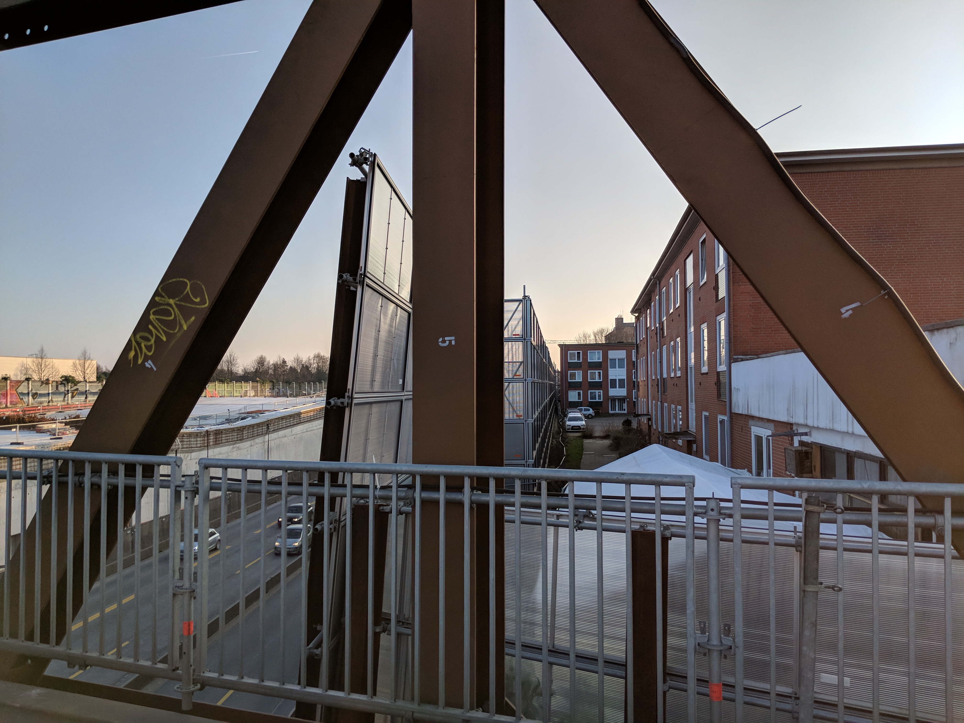 Hamburger Deckel - Stellingen - Brücke Wördemanns Weg